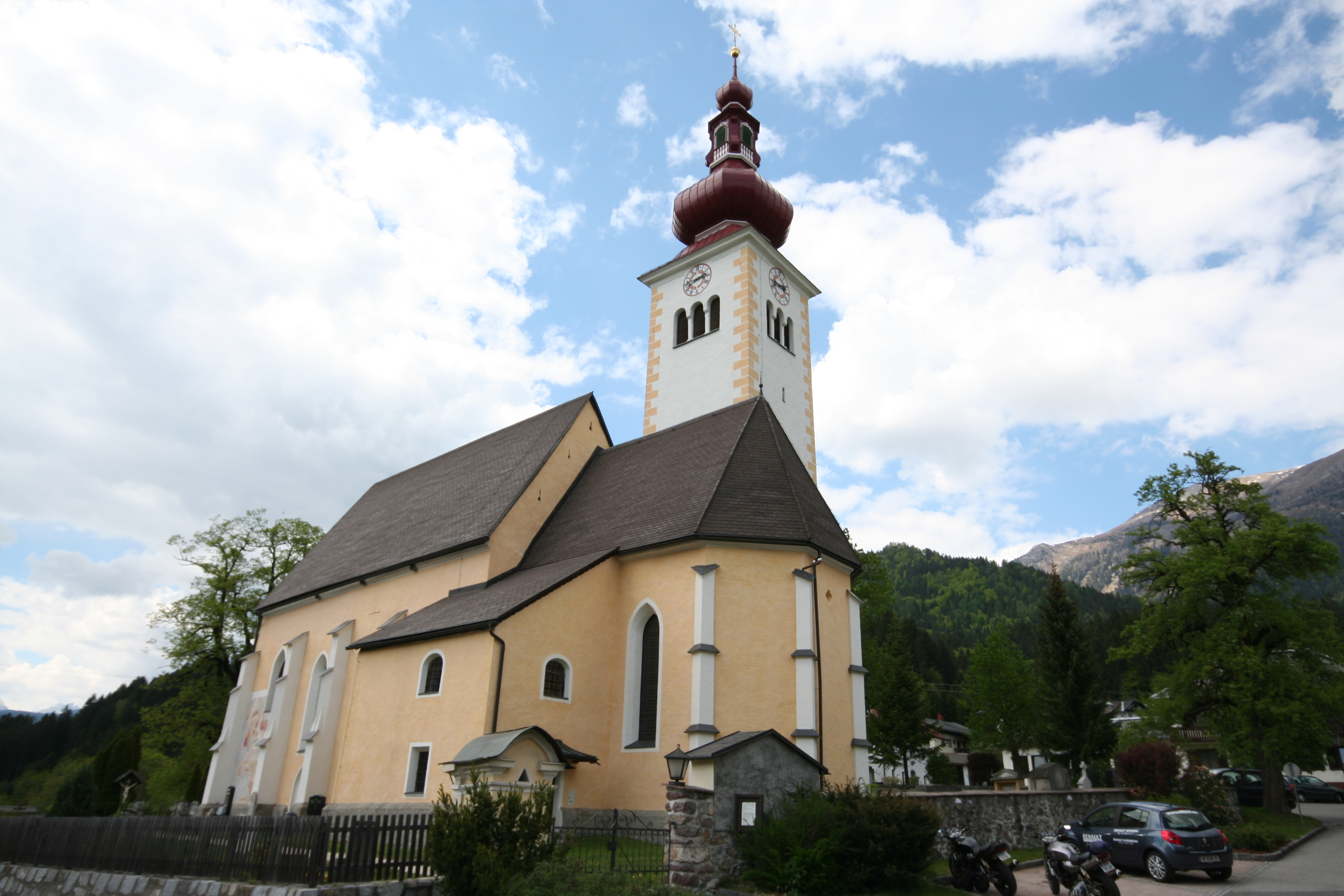 Pfarrkirche St. Daniel,Gemeinde Dellach im Gailtal